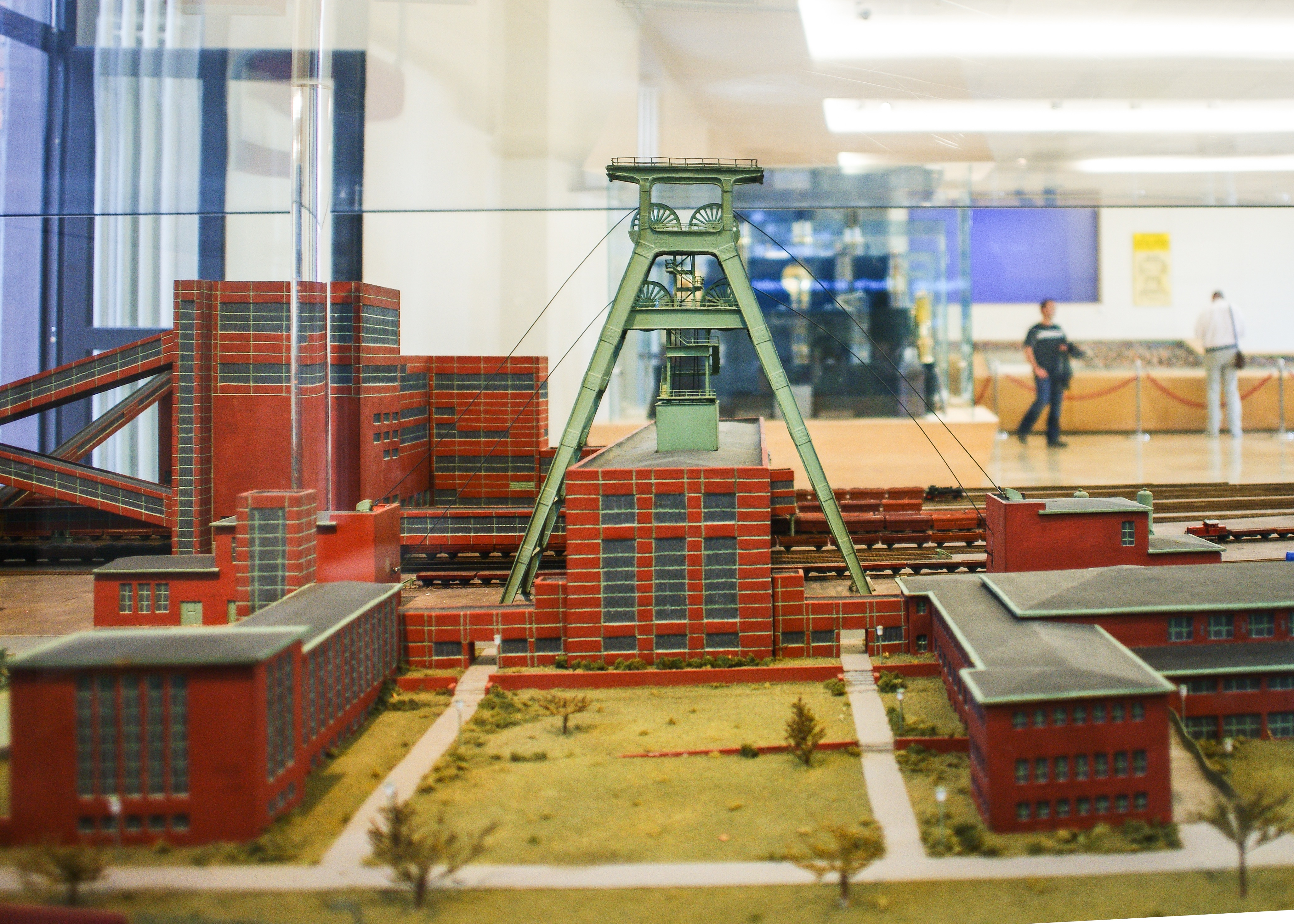 Deutsches Bergbau-Museum in Bochum (Besichtigung im Rahmen des Stammtisches Ruhrgebiet)